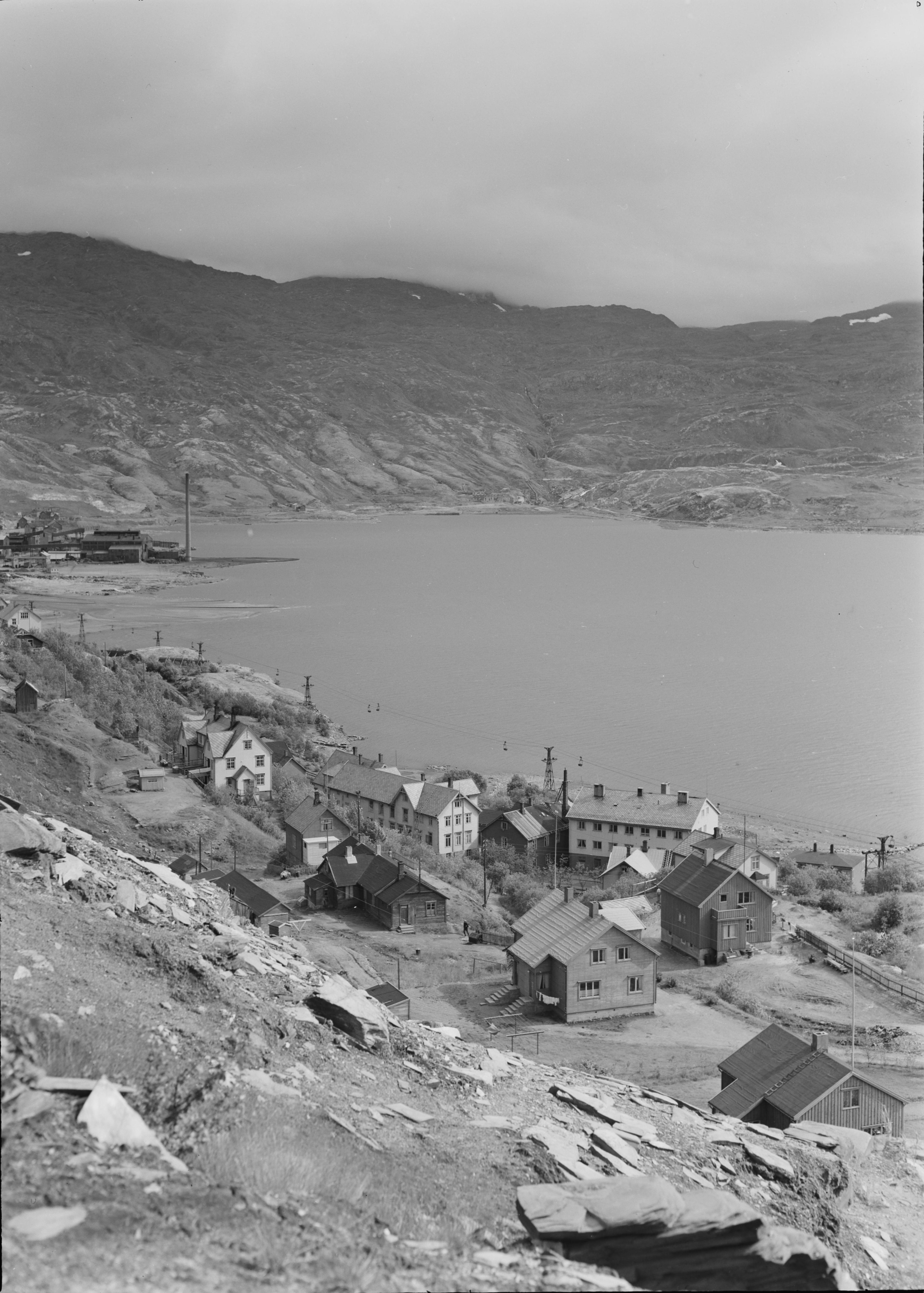 Bildet er hentet fra Nasjonalbibliotekets bildesamling. Anmerkninger til bildet var: Fotograf : ukjent Langvatnet,Sulitjelma, Fauske, Nordland